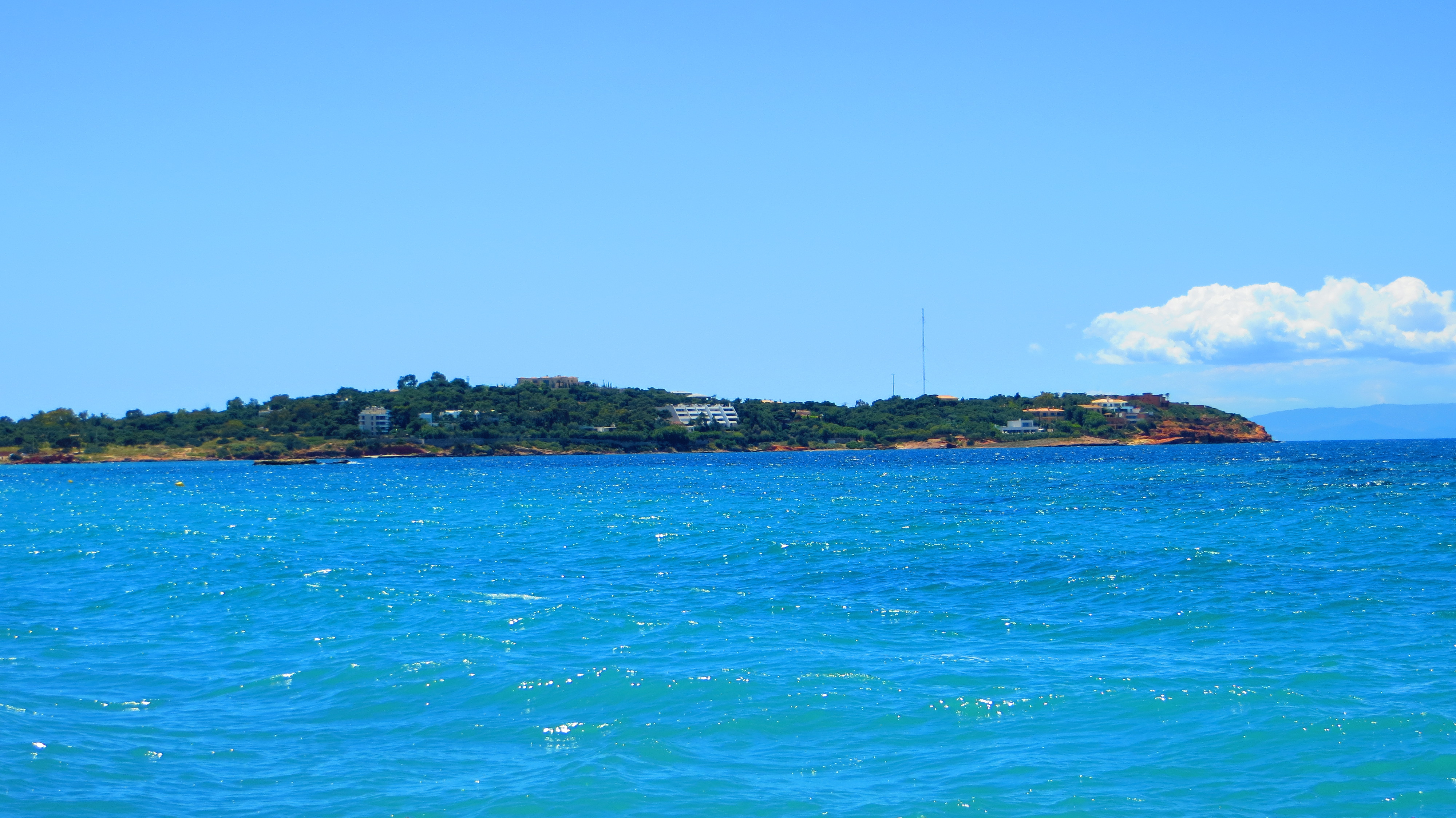 Vouliagmeni